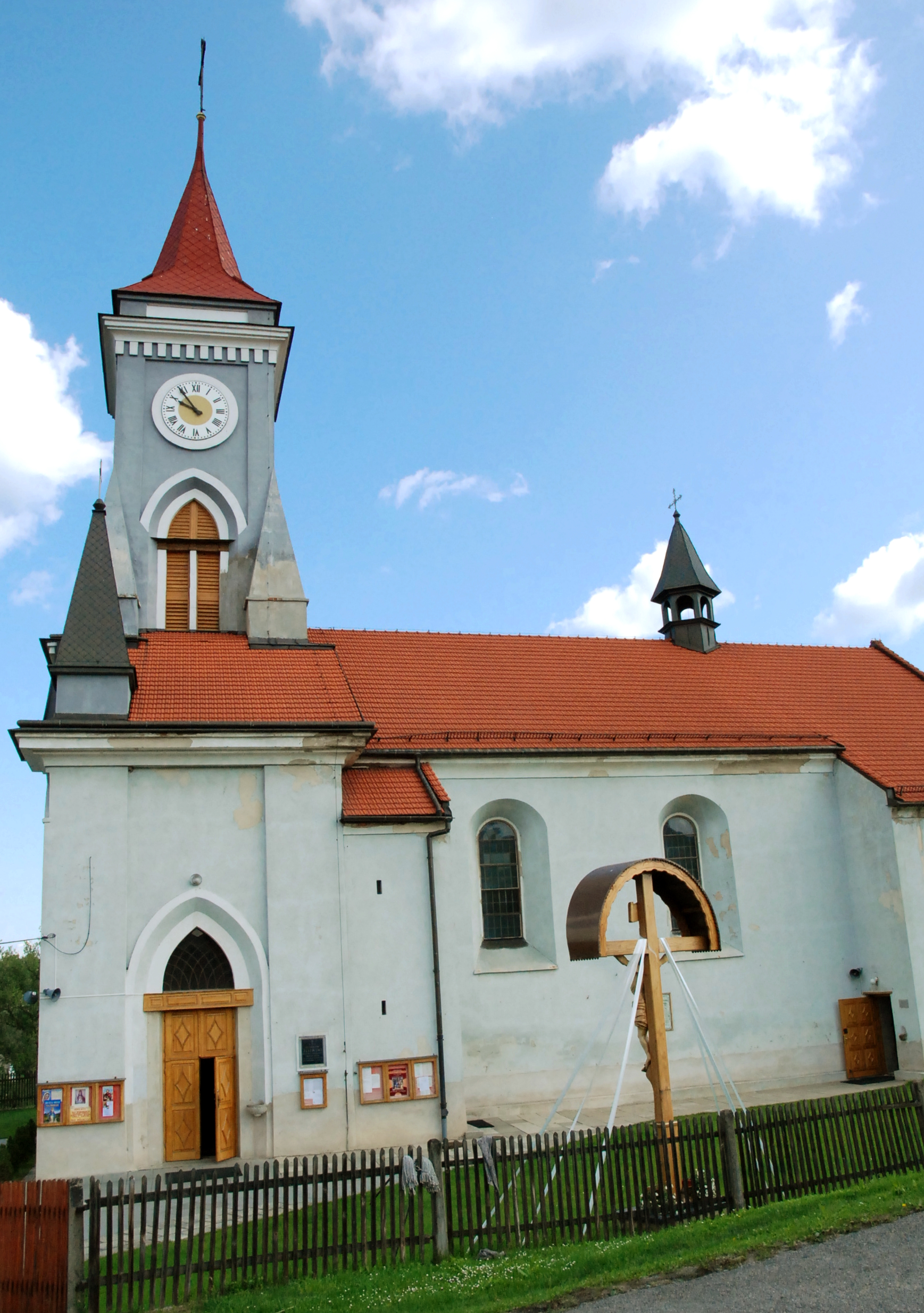 Kościół św. Jana Kantego, Stryszów